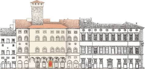 Palais Bartolini, Hotel Porta Rossa de Florence